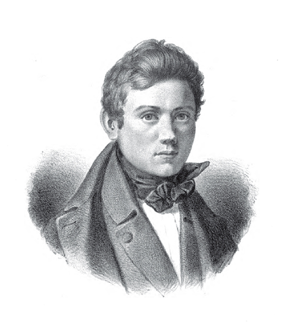 Per Wickenberg (1812-1846)